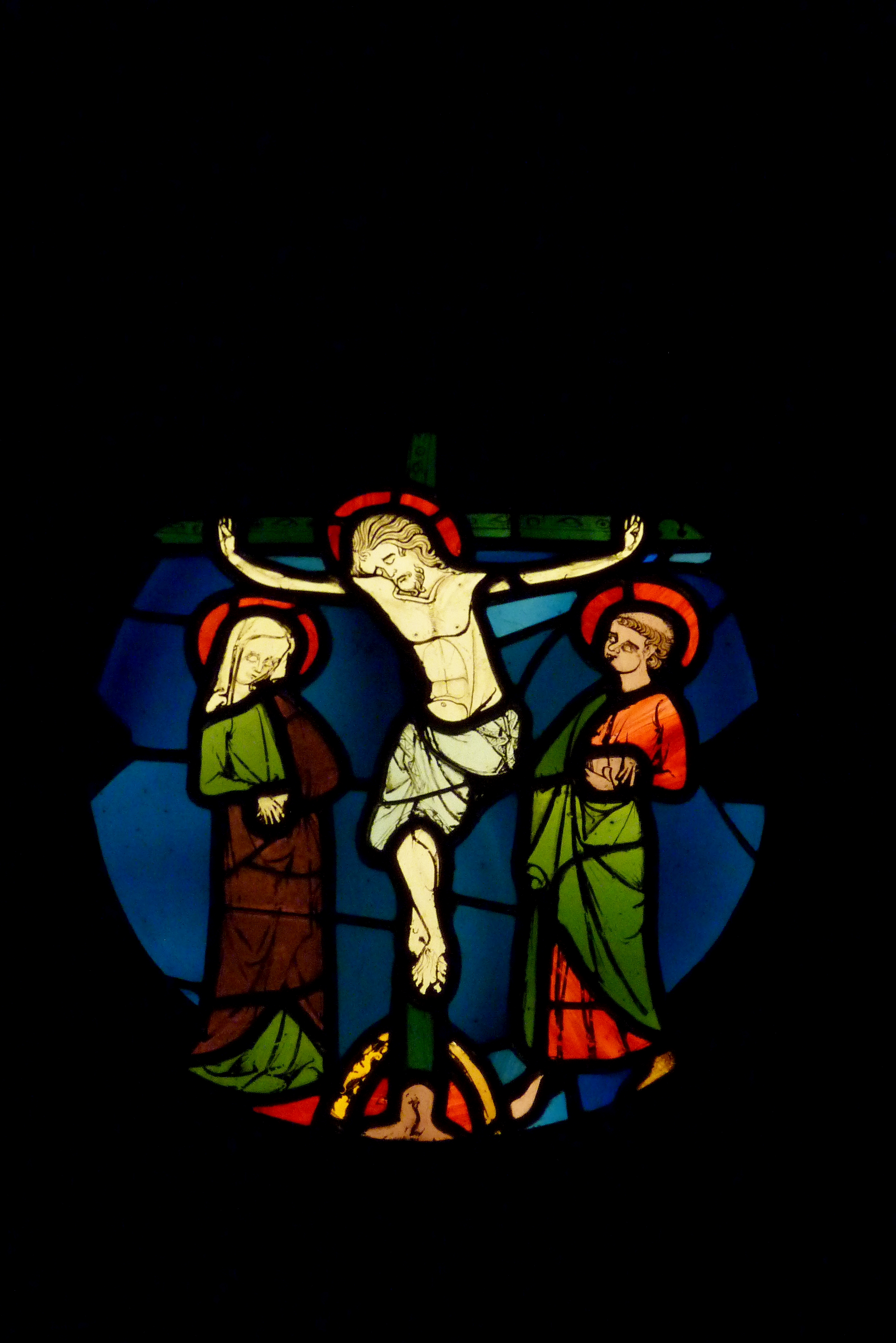 Bleiglasfenster im Musée National du Moyen Âge (Hôtel de Cluny) in Paris; Herkunft: Sainte-Chapelle in Paris, um 1275; Darstellung: Kreuzigung Christi